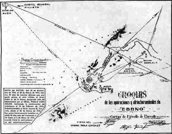 Plano de la Batalla de el Ebano